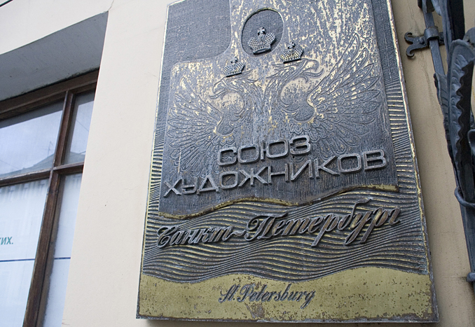 Союз художников. Санкт-Петербург